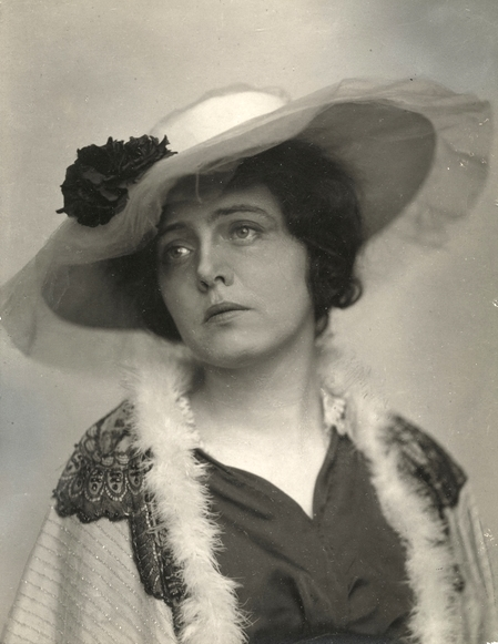 portrett, kvinne, skuespillerinne, rollebilde, brystbilde, kostyme.